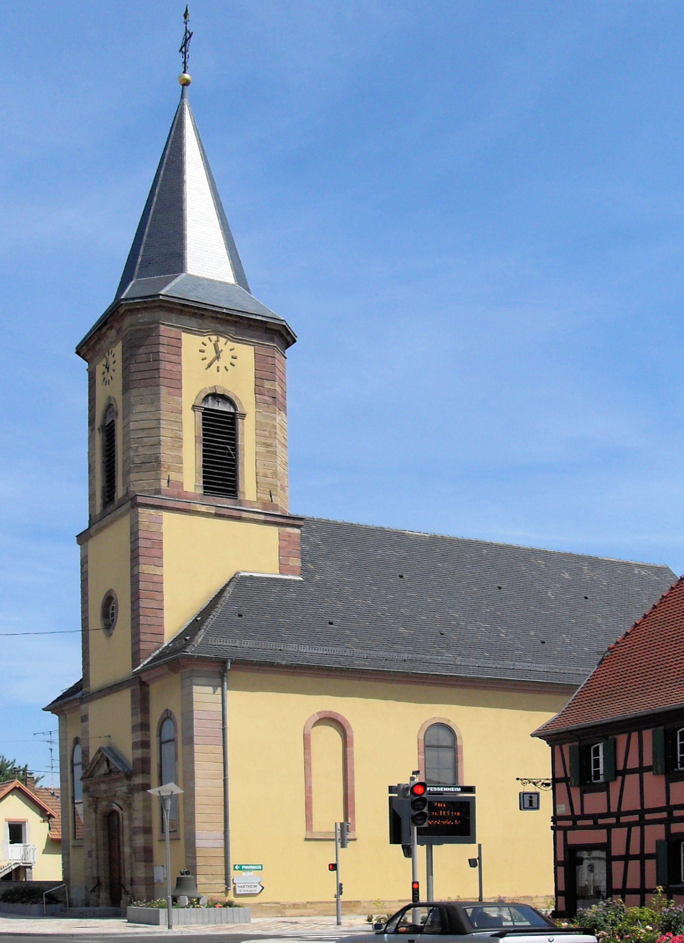 L'église Sainte-Colombe à Fessenheim